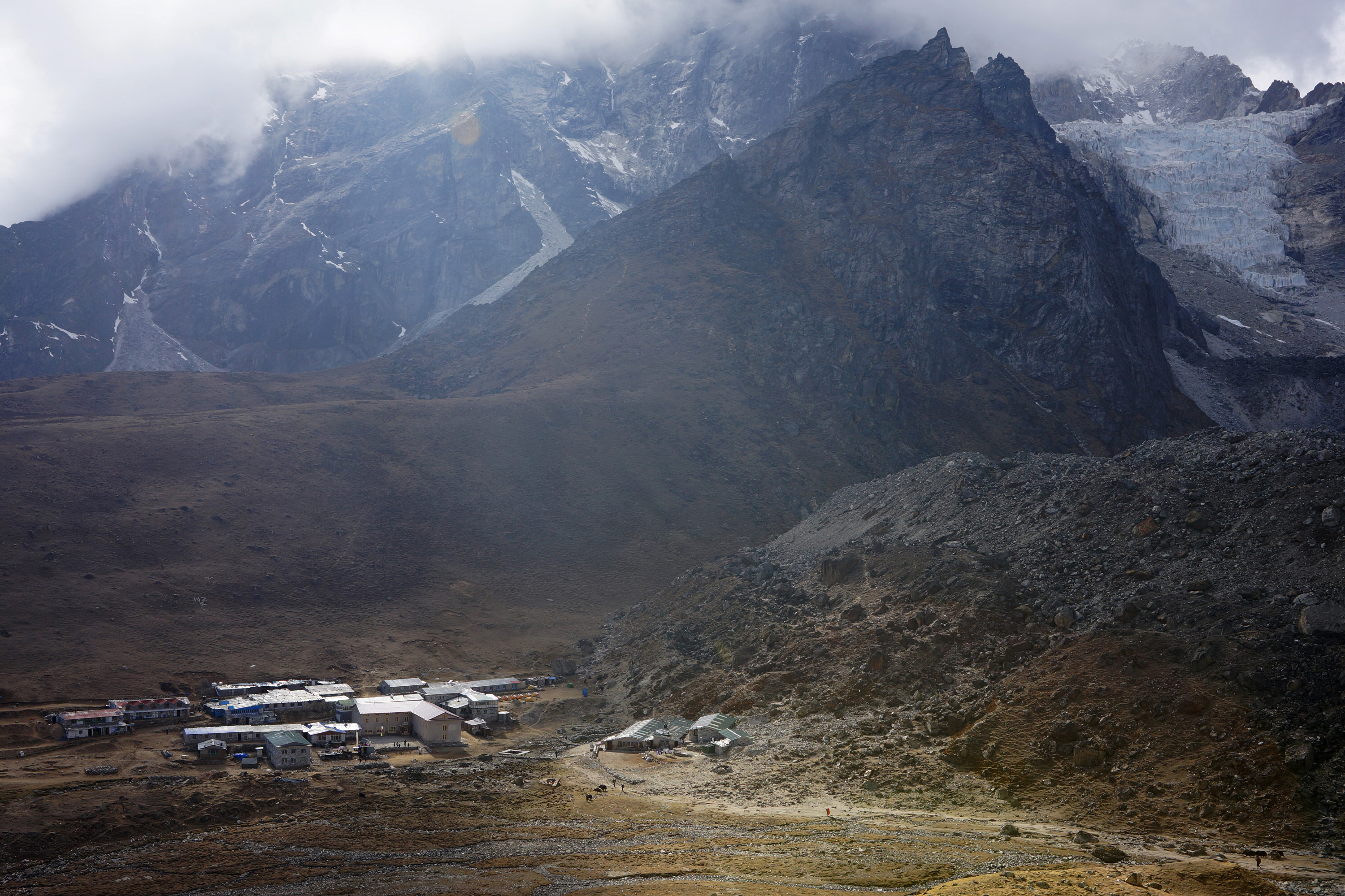 Lobuche, Nepal